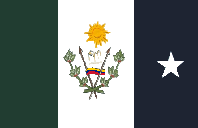 Bandera del municipio Ospino. Estado Portuguesa. Venezuela